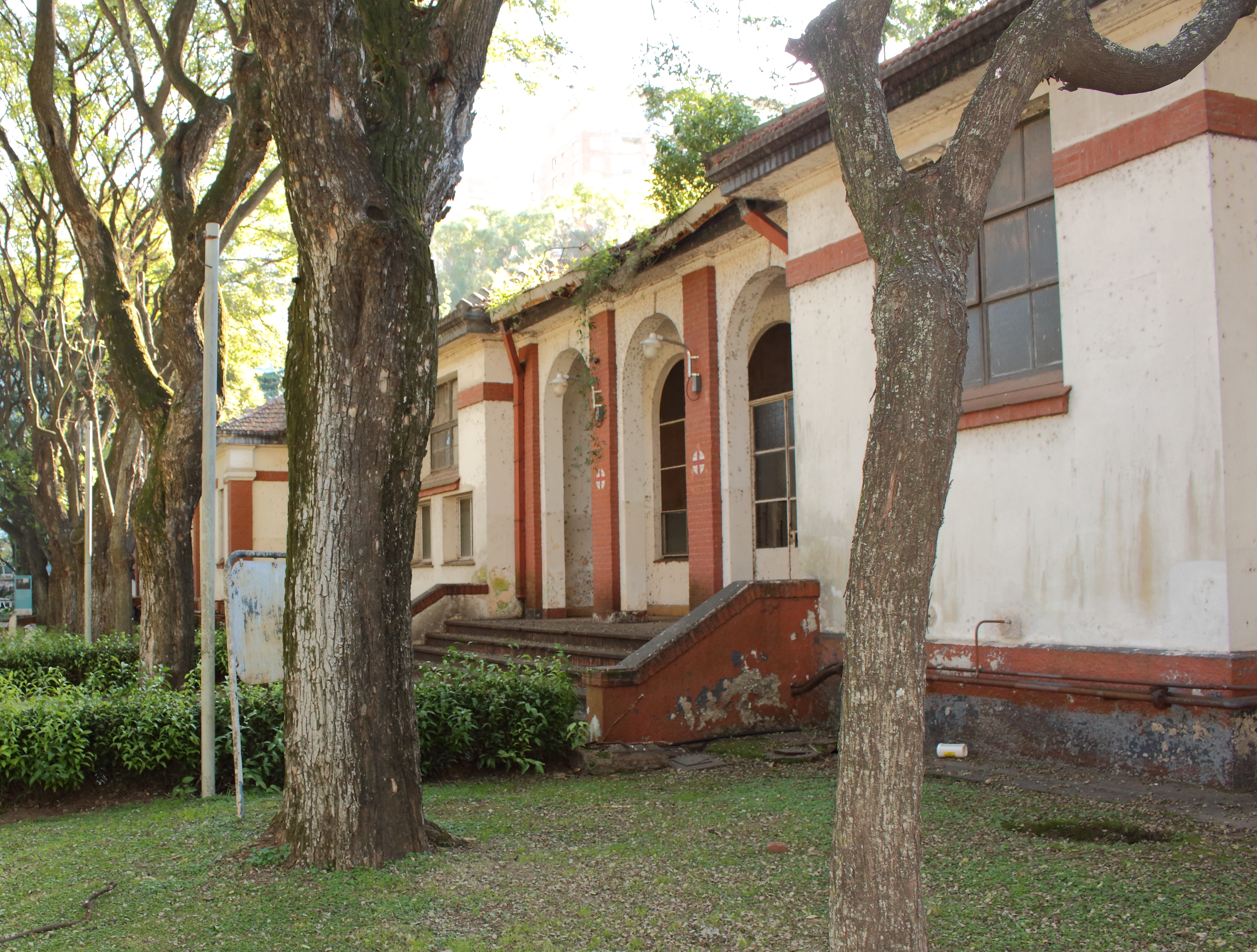 Fachada del edificio que fuera la enfermería de la ESMA